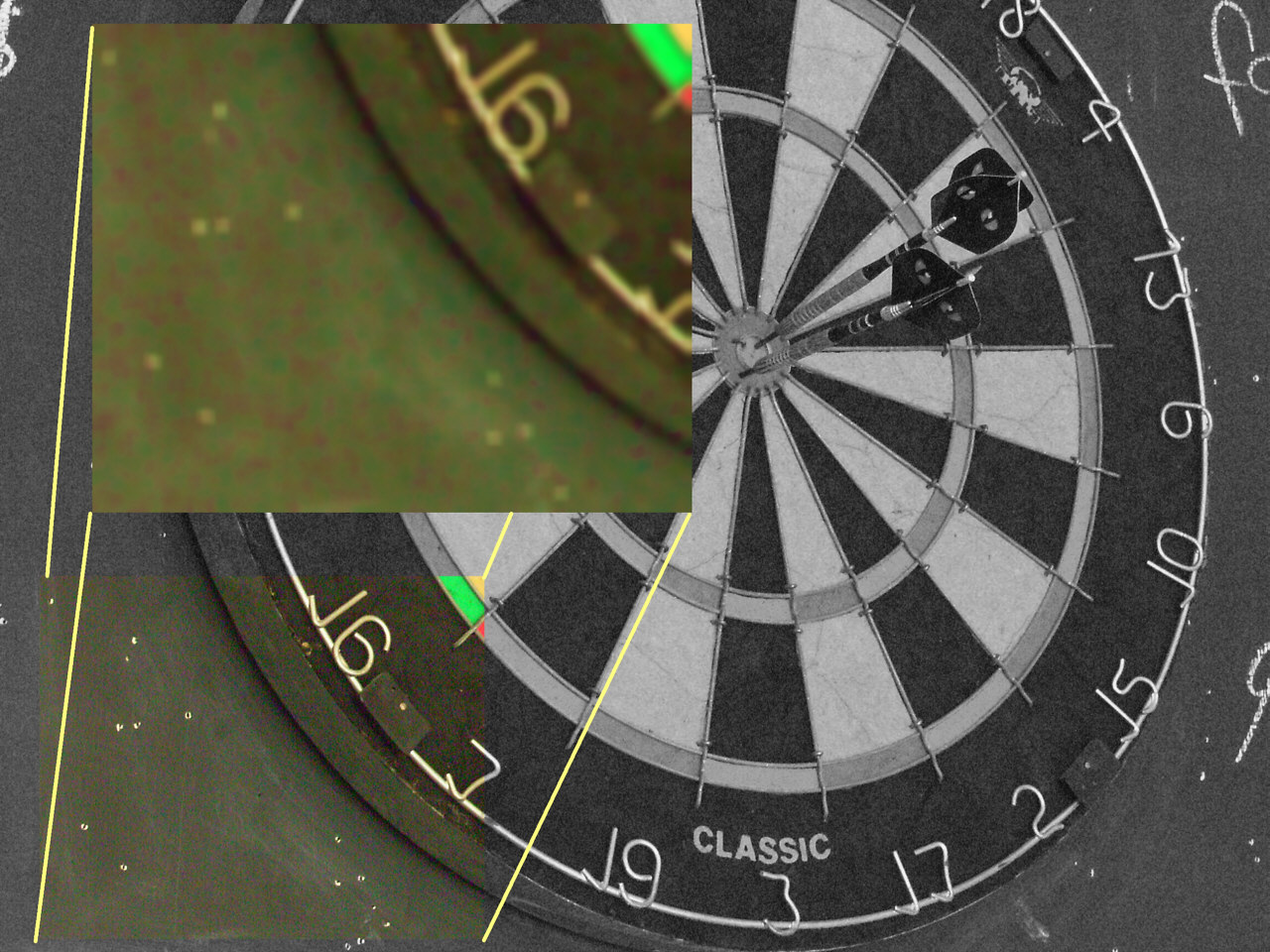 Very Low Frequency Noise - Farbrauschen mit sehr niedriger Frequenz. Zur besseren Anschauung im vergrößerten Ausschnitt stark weichgezeichnet und Farbsättigung angehoben.